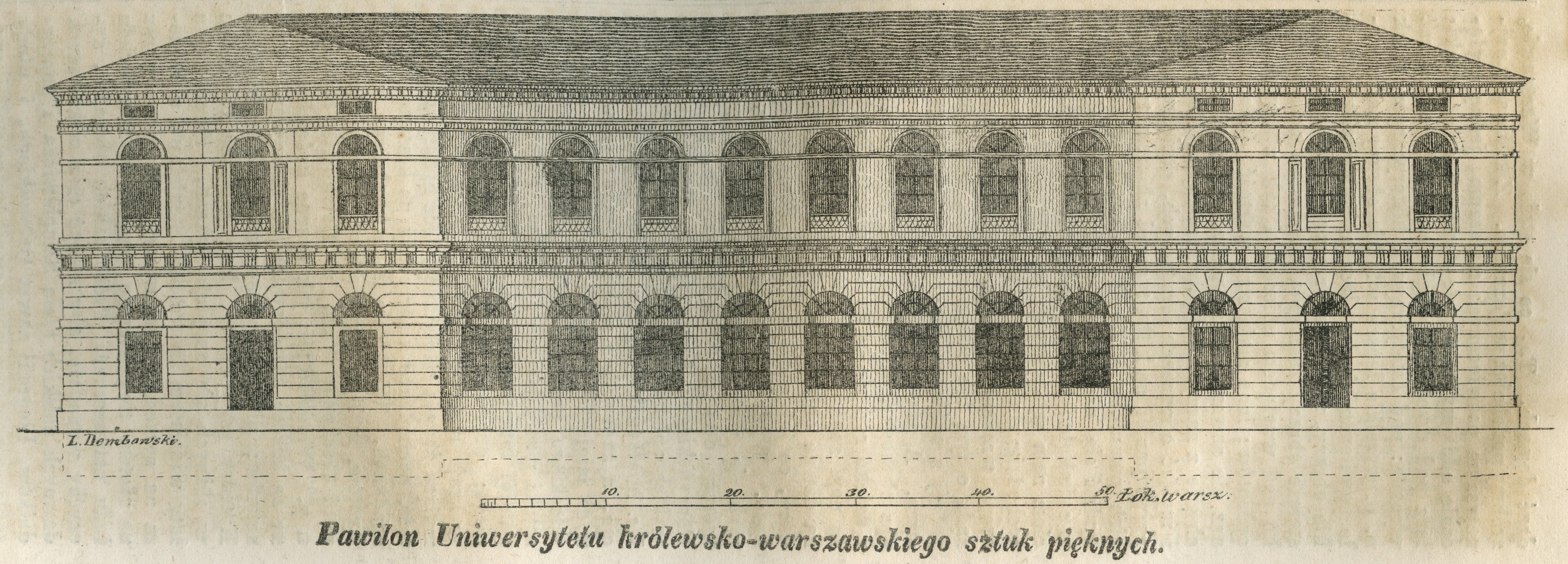 Pawilon Uniwersytetu Królewsko-Warszawskiego sztuk pięknych